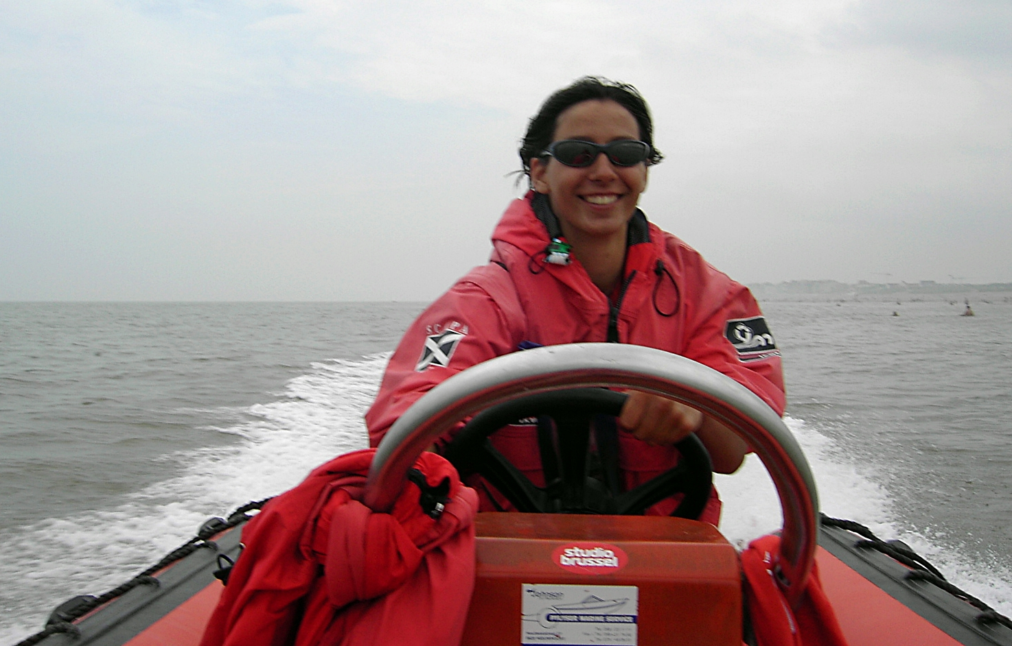 Een redder aan het werk